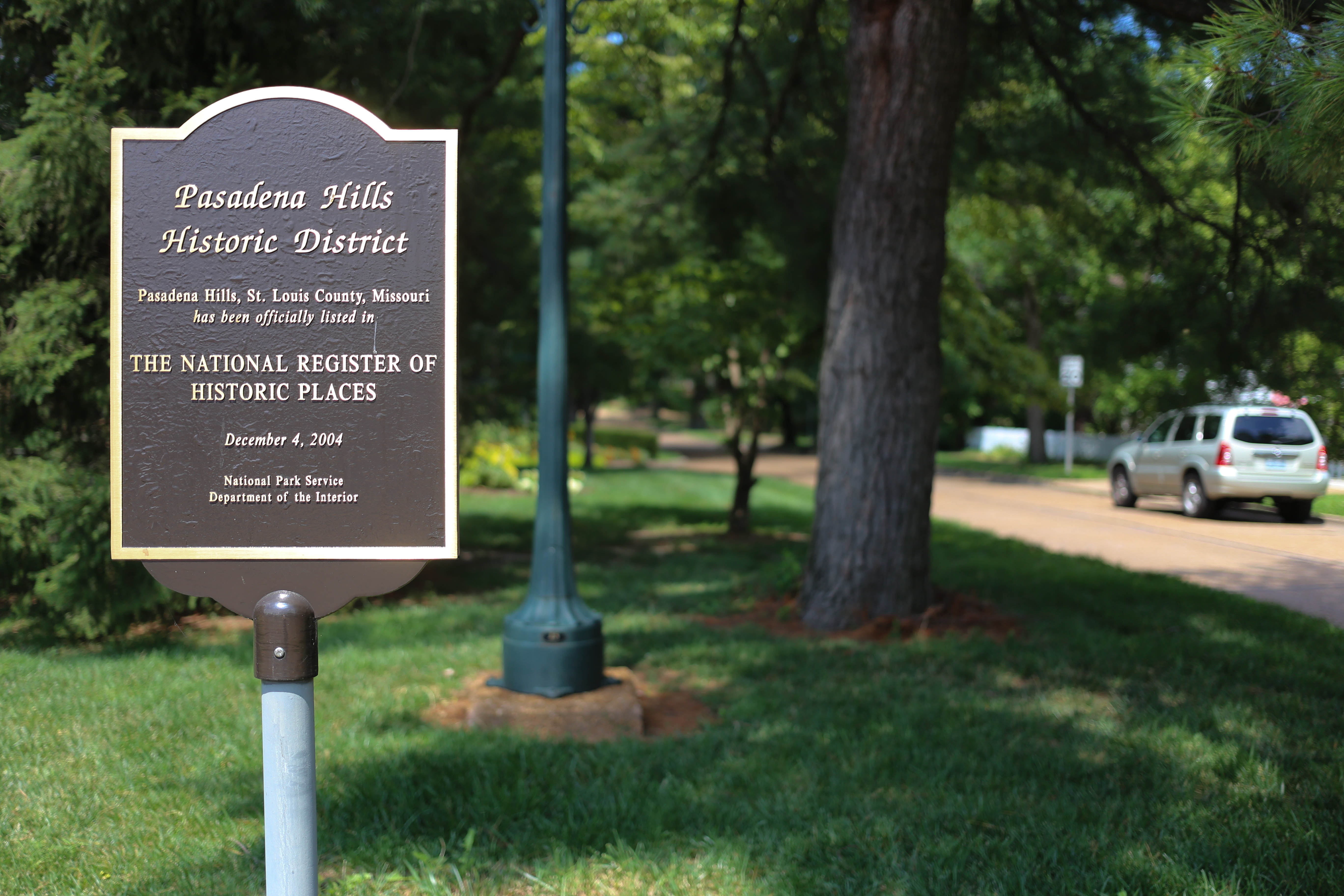 Pasadena Hills Historic District